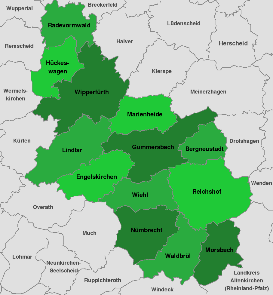 thumb|right|Original (Original text: Oberbergischer Kreis mit Gemeindegrenzen)